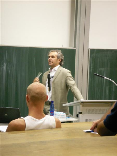 Das Tier im Recht – rechtspolitische Postulate